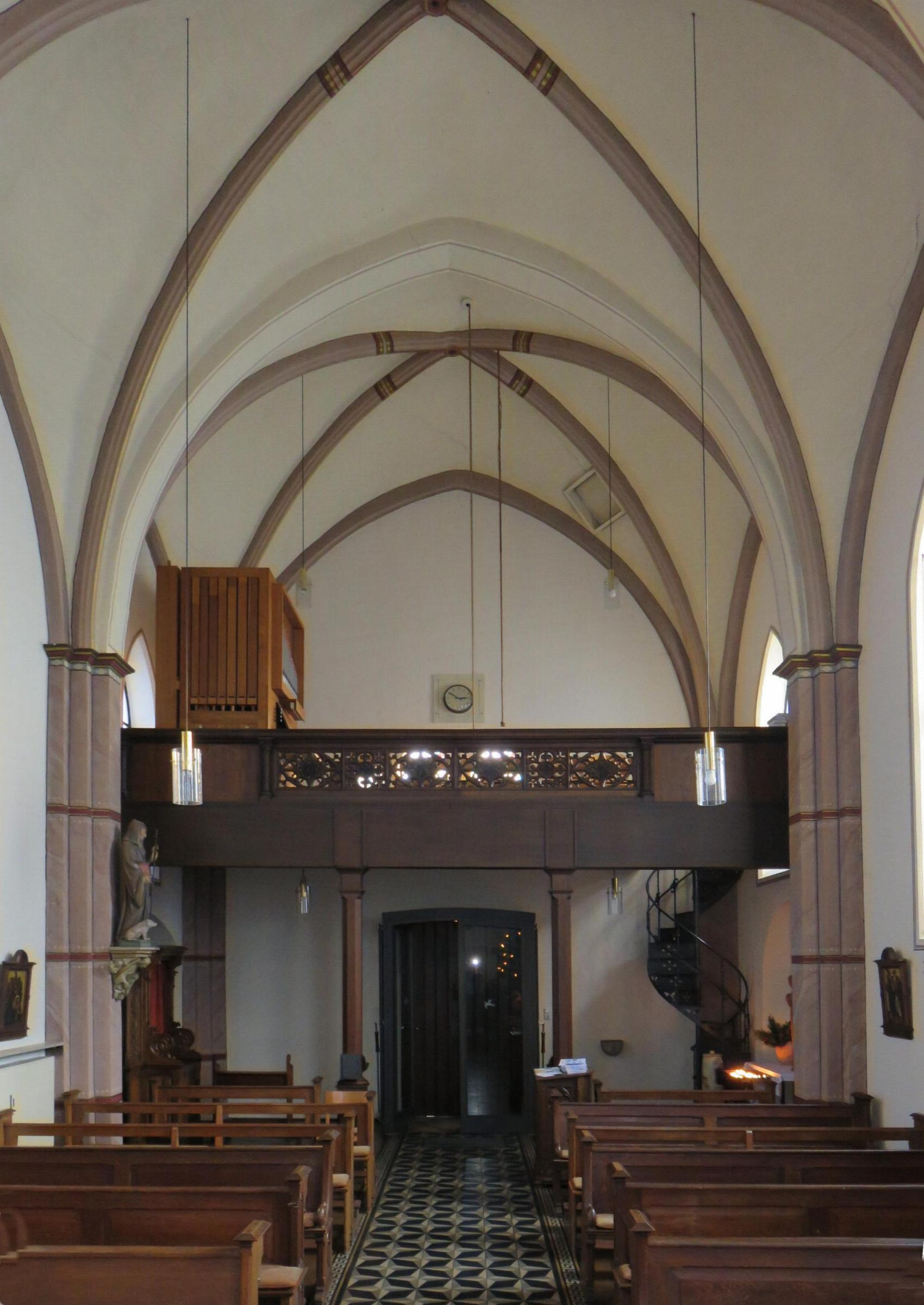 Kirche in Kuckum